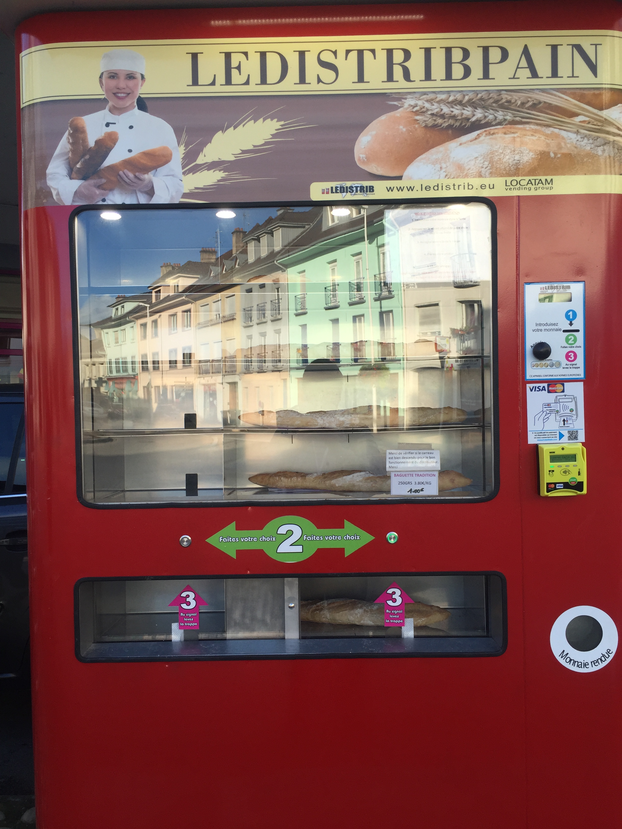 FIG2016 dans les Vosges : "Distribpain", distributeur de baguettes de pain.